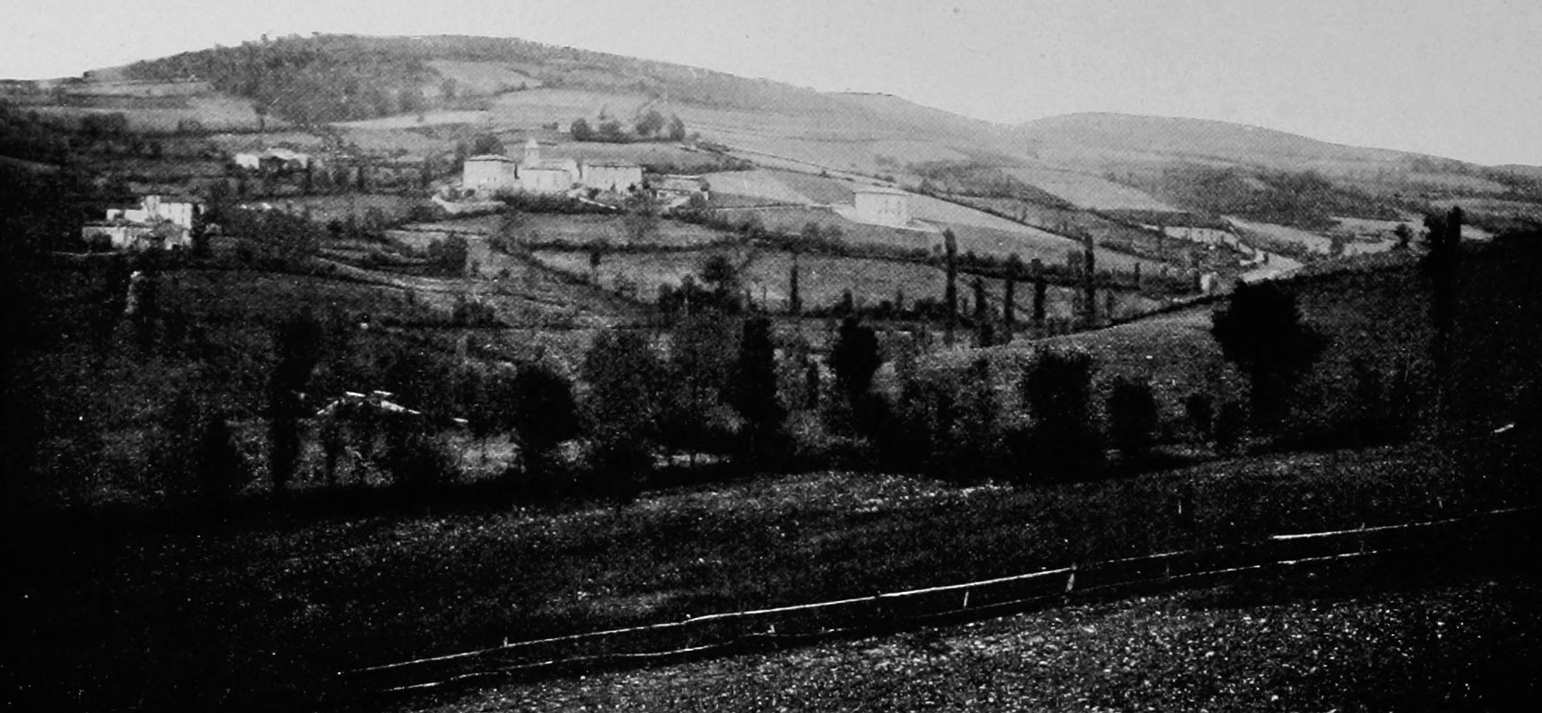 Dictionnaire illustré des communes du département du Rhône. Tome 2 / par MM. E. de Rolland et D. Clouzet.